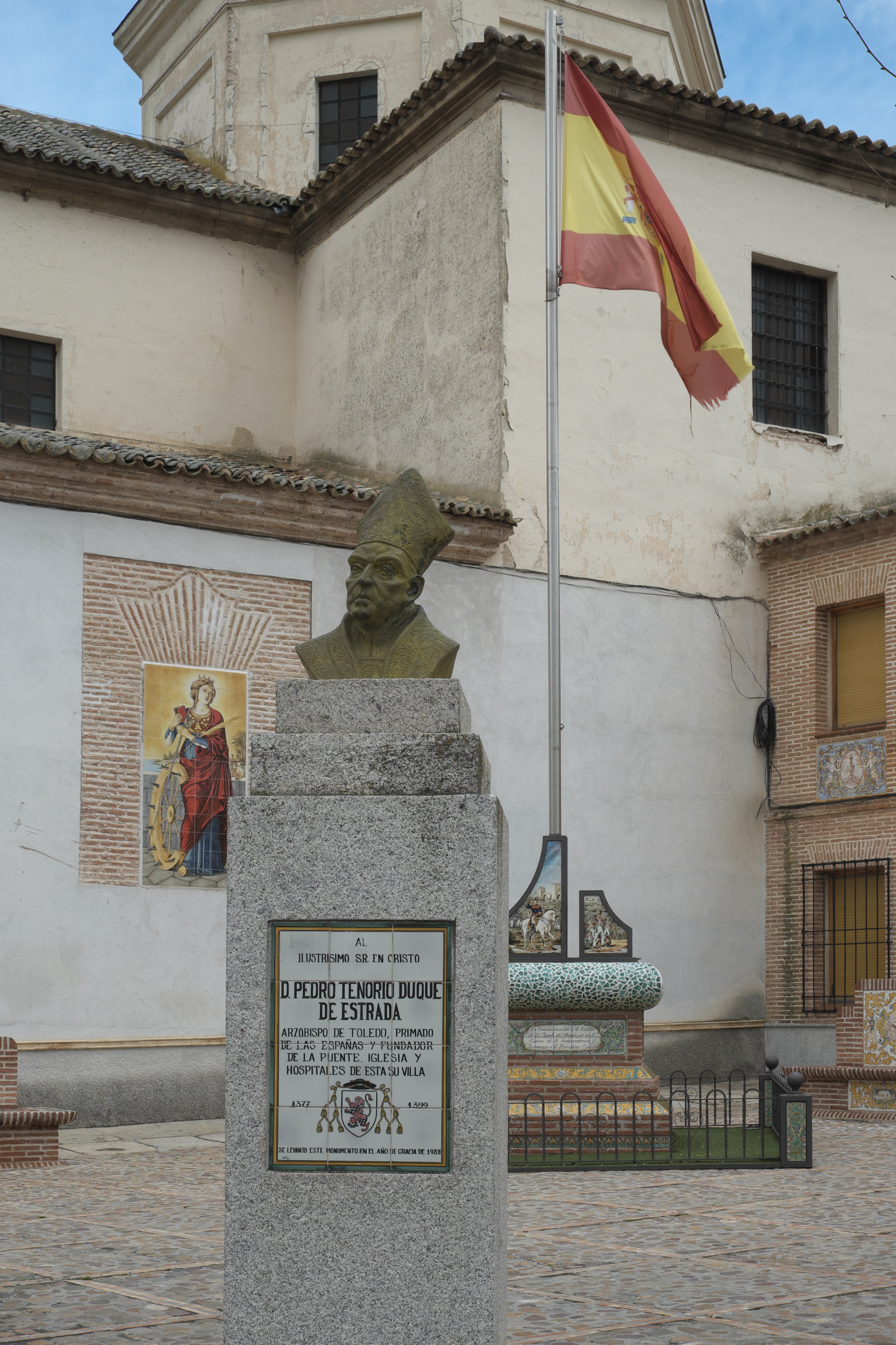 El Puente del Arzobispo in der Provinz Toledo (Kastilien-La Mancha/Spanien), Monument mit Buüste und Keramikfliesen, Darstellung: Don Pedro Tenorio Duque de Estrada, von 1377 bis 1399 Erzbischof von Toledo